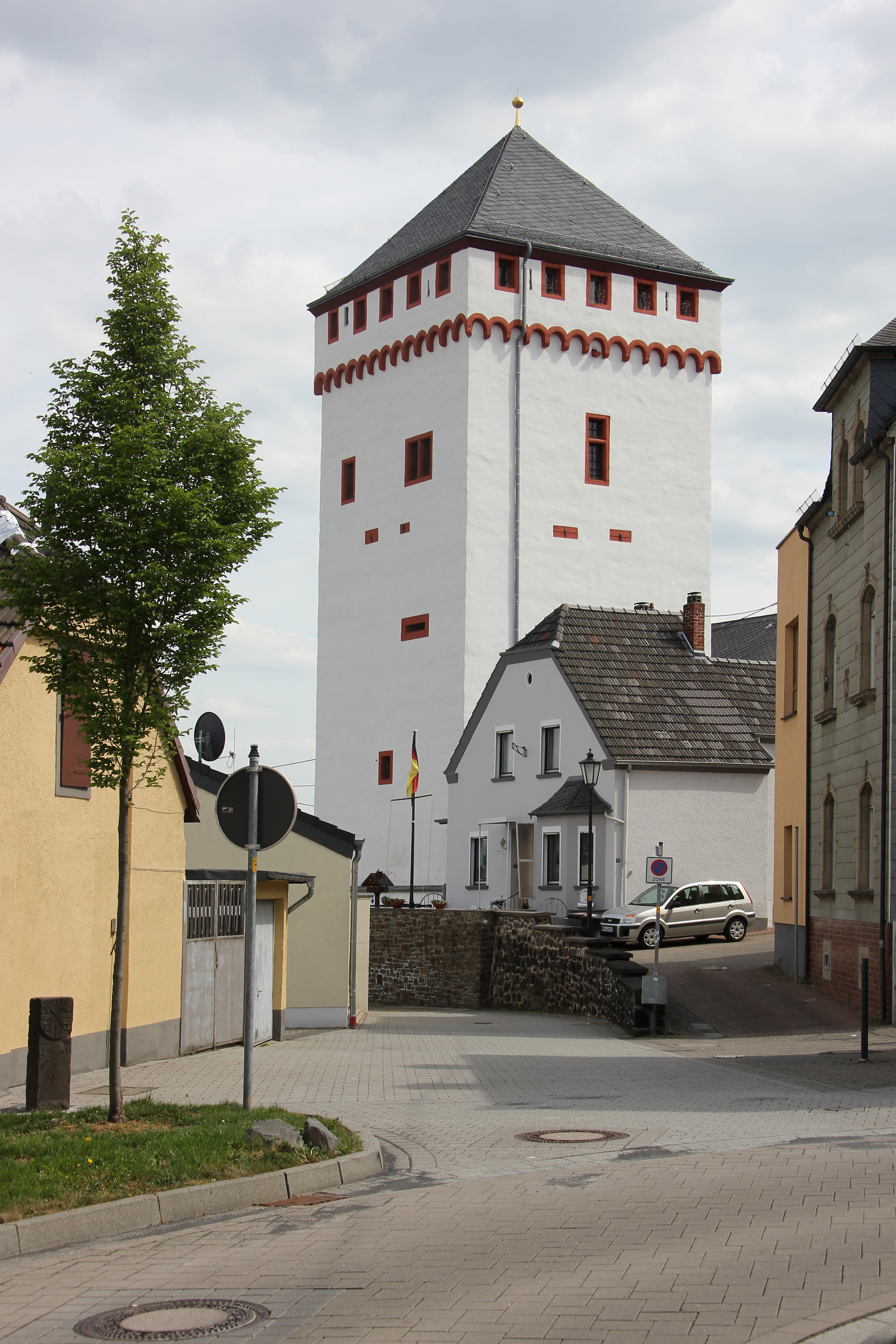 Der Weiße Turm in Weißenthurm, ehemaliger Grenzturm zwischen Kurtrier und Kurköln, erbaut um 1400; Blick von Nordwesten